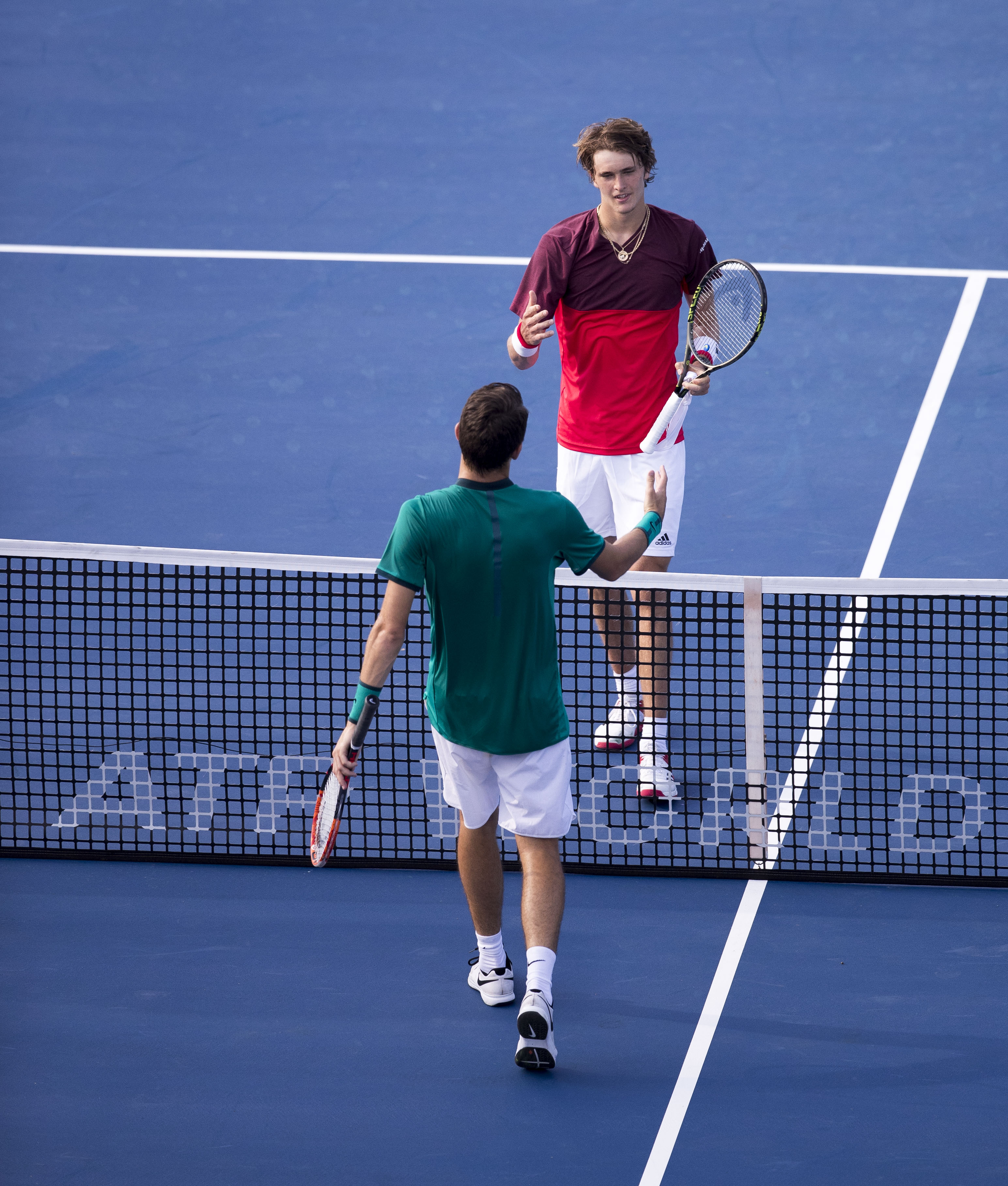 2016 Citi Open